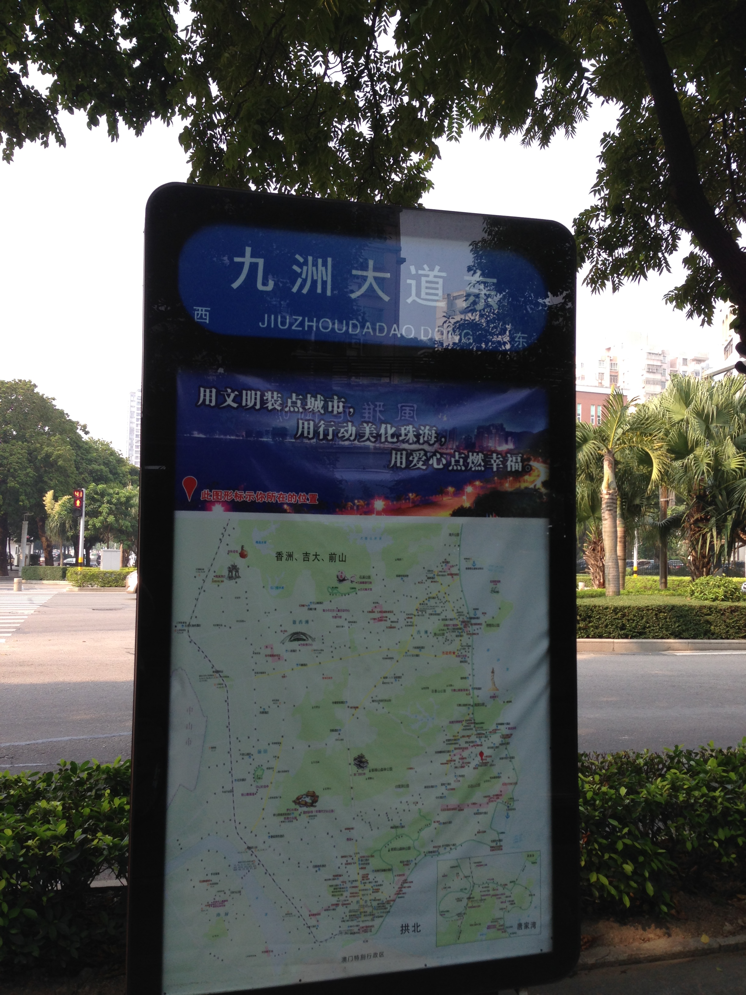 九洲大道东路牌